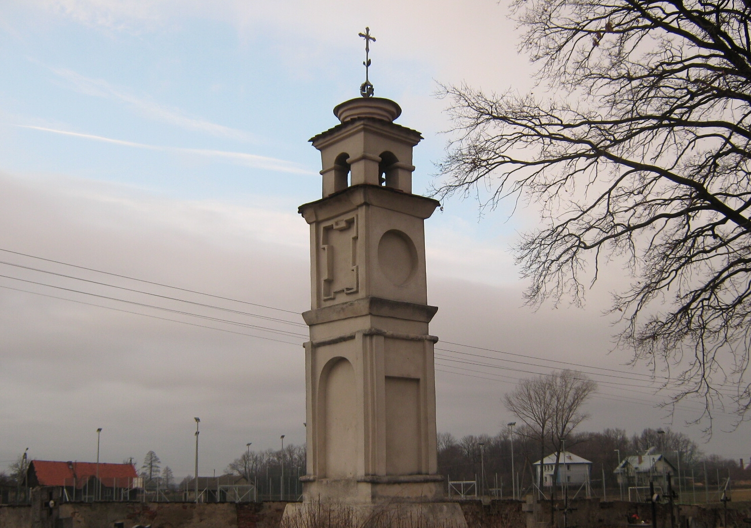 Latarnia Zmarłych". Cmentarz ,,Dolny" w Przewrotnem. 02.1980.